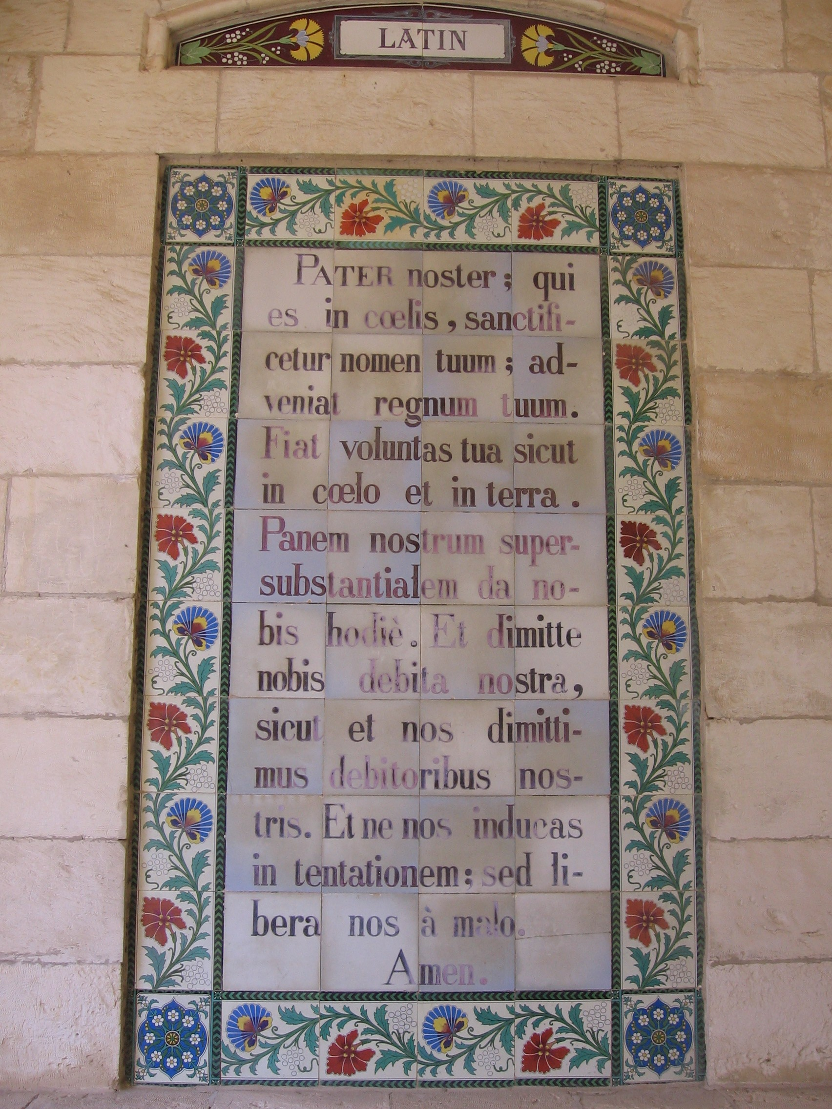 Chiesa del Padre Nostro, a Gerusalemme. Preghiera in latino